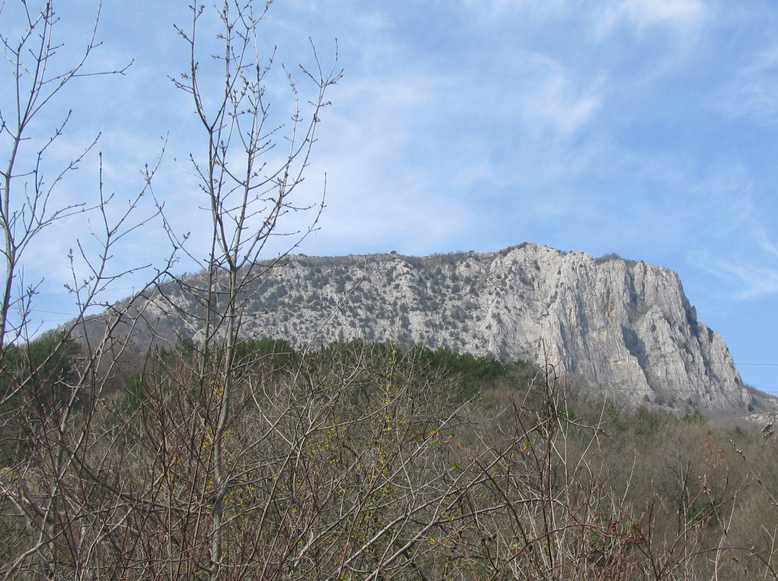 Парагильмен - самый крупный отторженец Крыма. Вид с трассы Ялта-Симферополь.